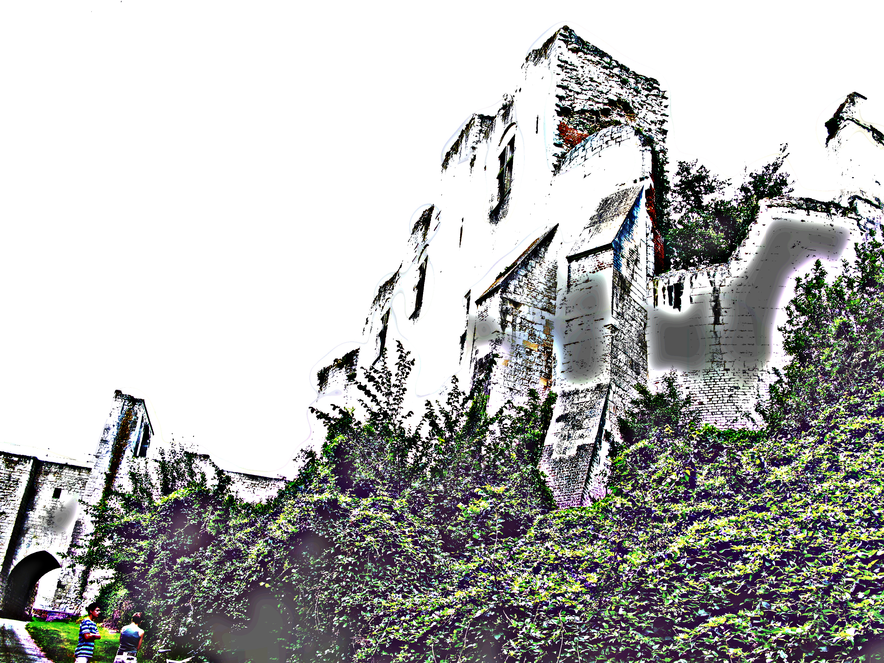 Picquigny (Somme, France) - Chemin montant au château. Traitement numérique pour essai, afin de comparer avec le dessin de Louis Duthoit (vue sous le même angle ou presque).